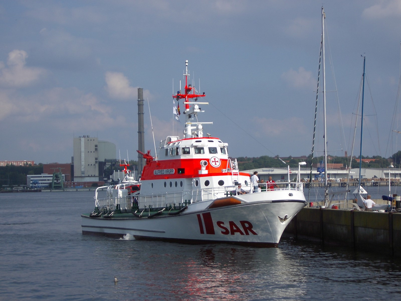 Seenotkreuzer Alfried Krupp der Deutschen Gesellschaft zur Rettung Schiffbrüchiger (DGzRS) im Kieler Hafen.